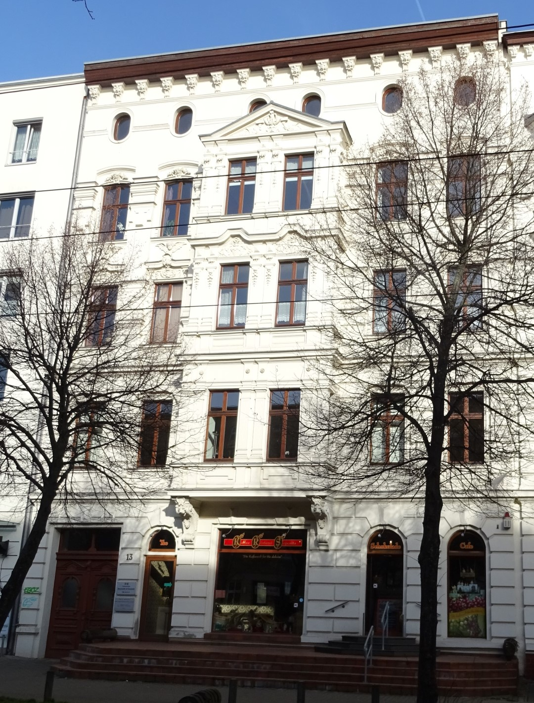 Magdeburg Olvenstedter Str. 13 (Kulturdenkmal)